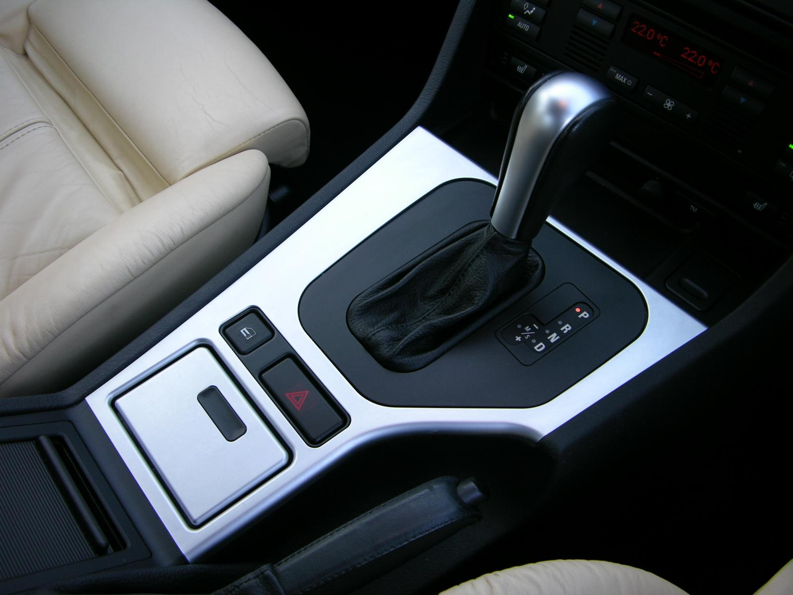 BMW 530i Sport Individual